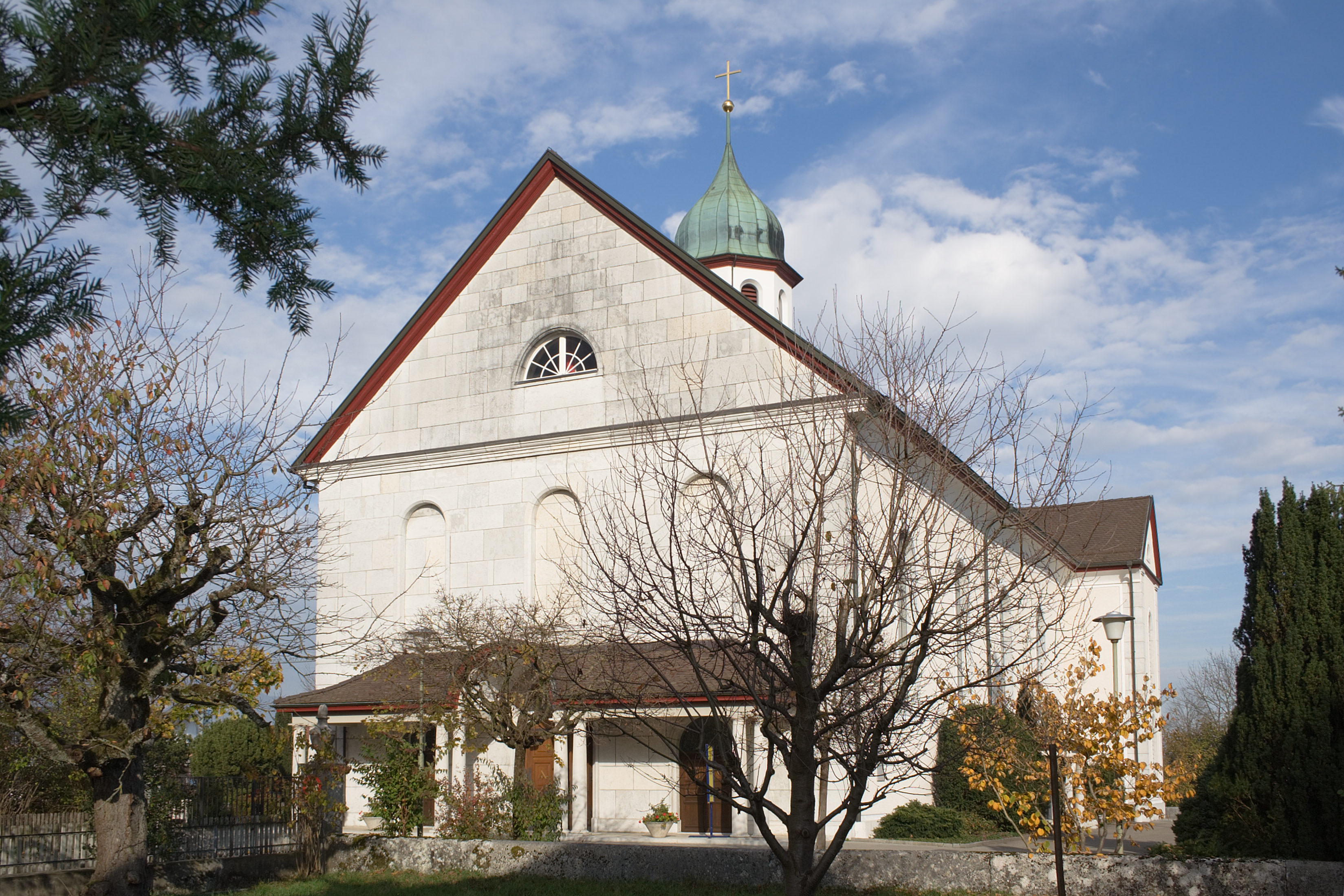 Römisch-katholische Kirche Biberist, Schweiz